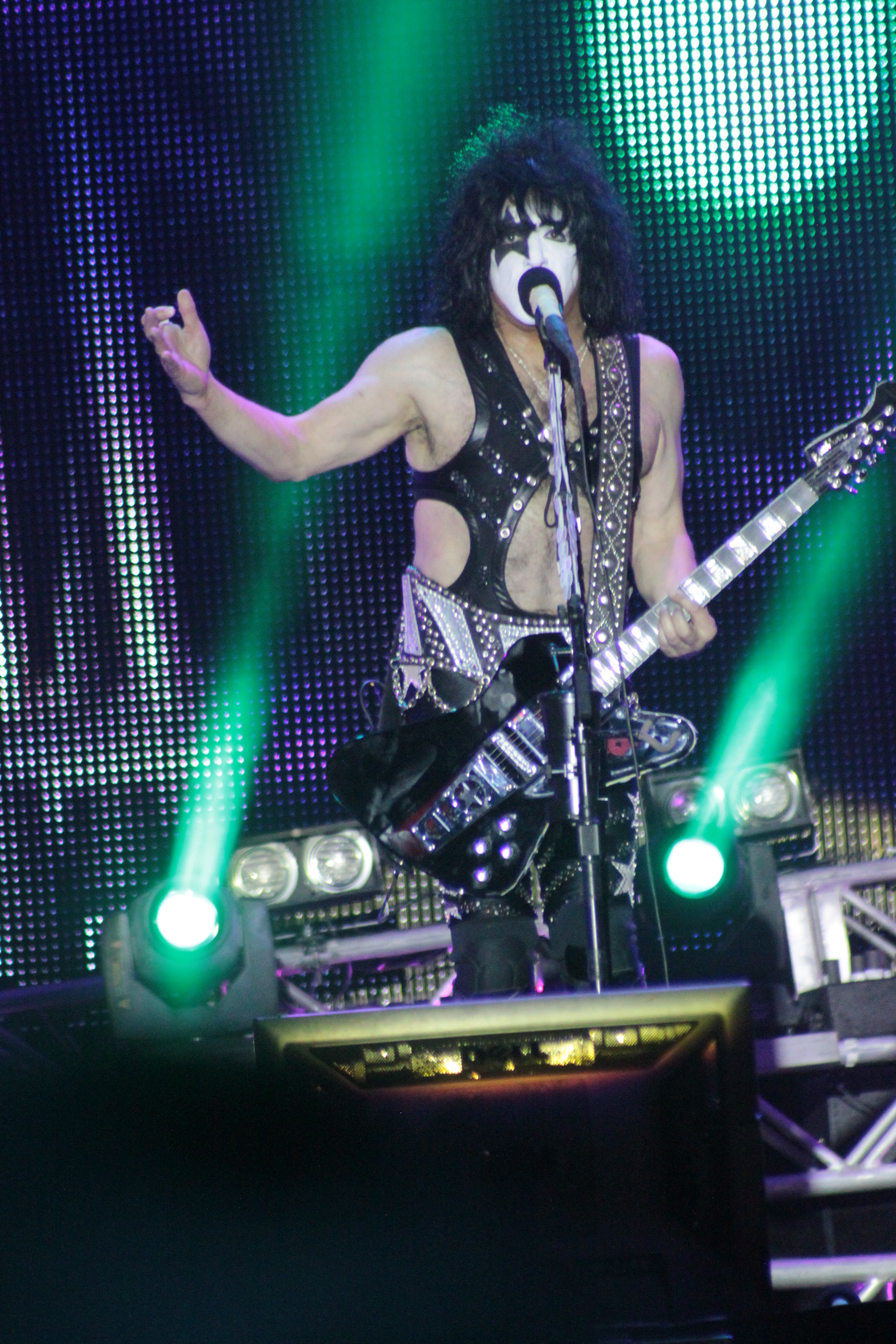 Paul Stanley, Kiss, Helfest 2013, Fr-44-Clisson.